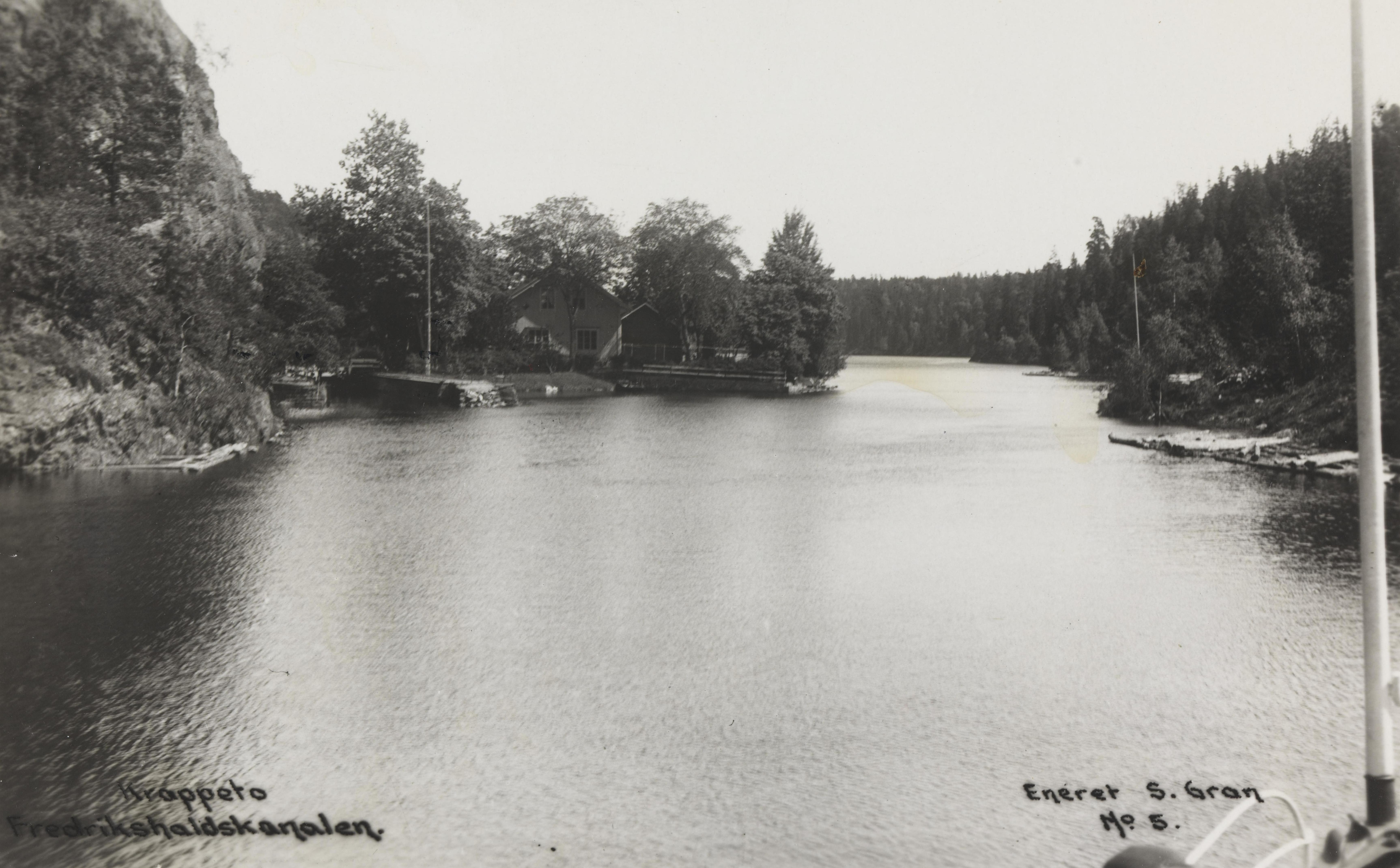 Bildet er hentet fra Nasjonalbibliotekets bildesamling Krappeto,Stenselva, Halden, Østfold